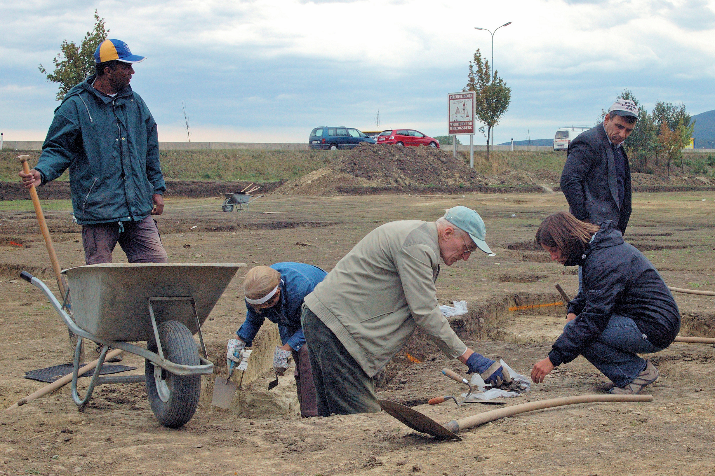 Siedlung der Linearbandkeramik